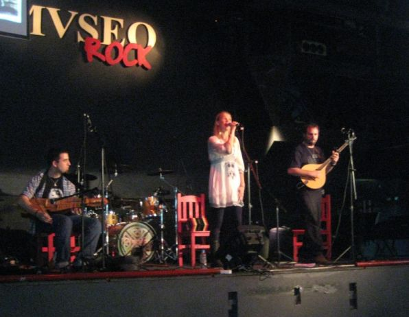 Huldreslåt en vivo en Mvuseo Rock - Octubre 1, 2011